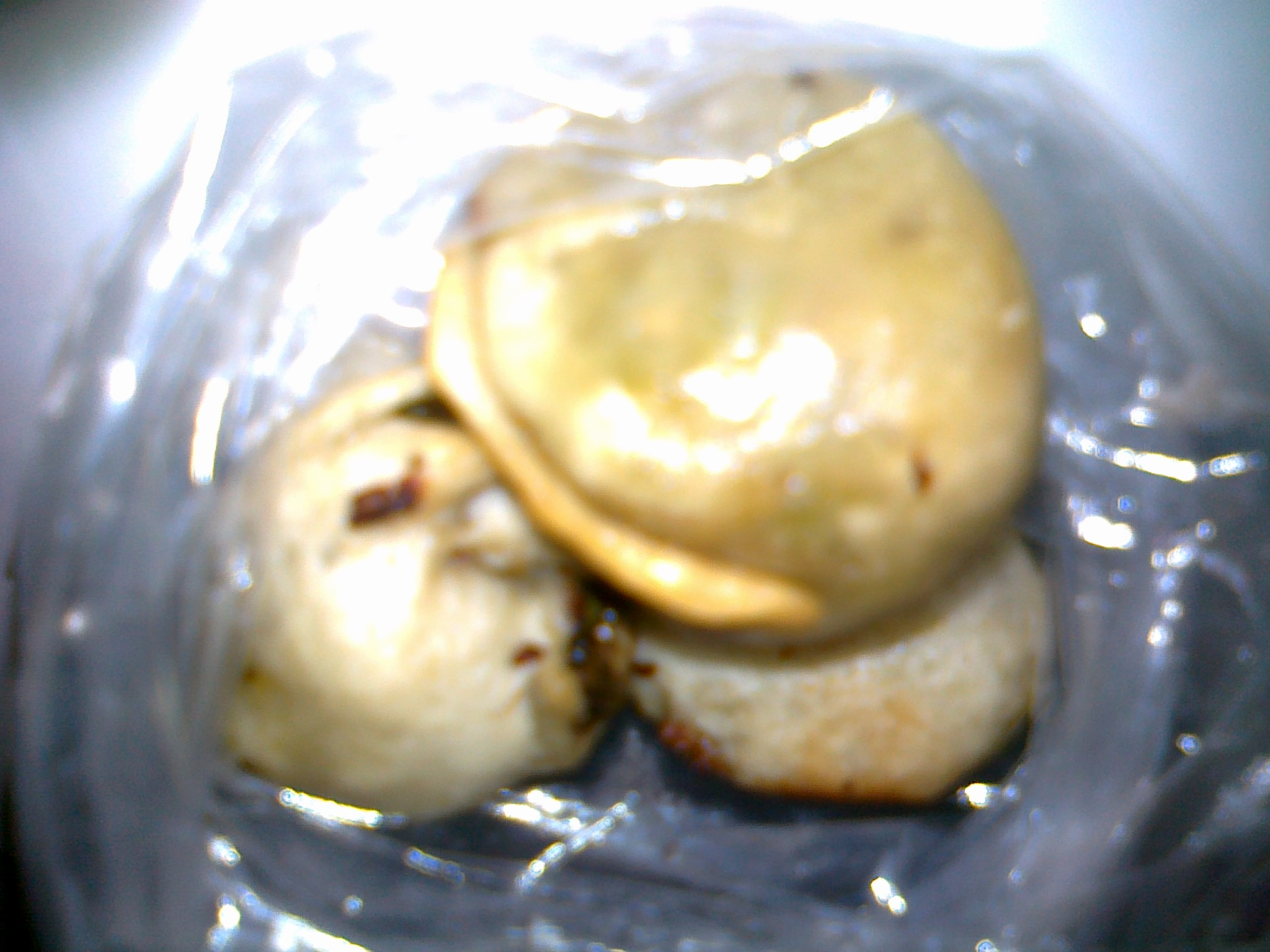 olos, jajanan khas Tegal